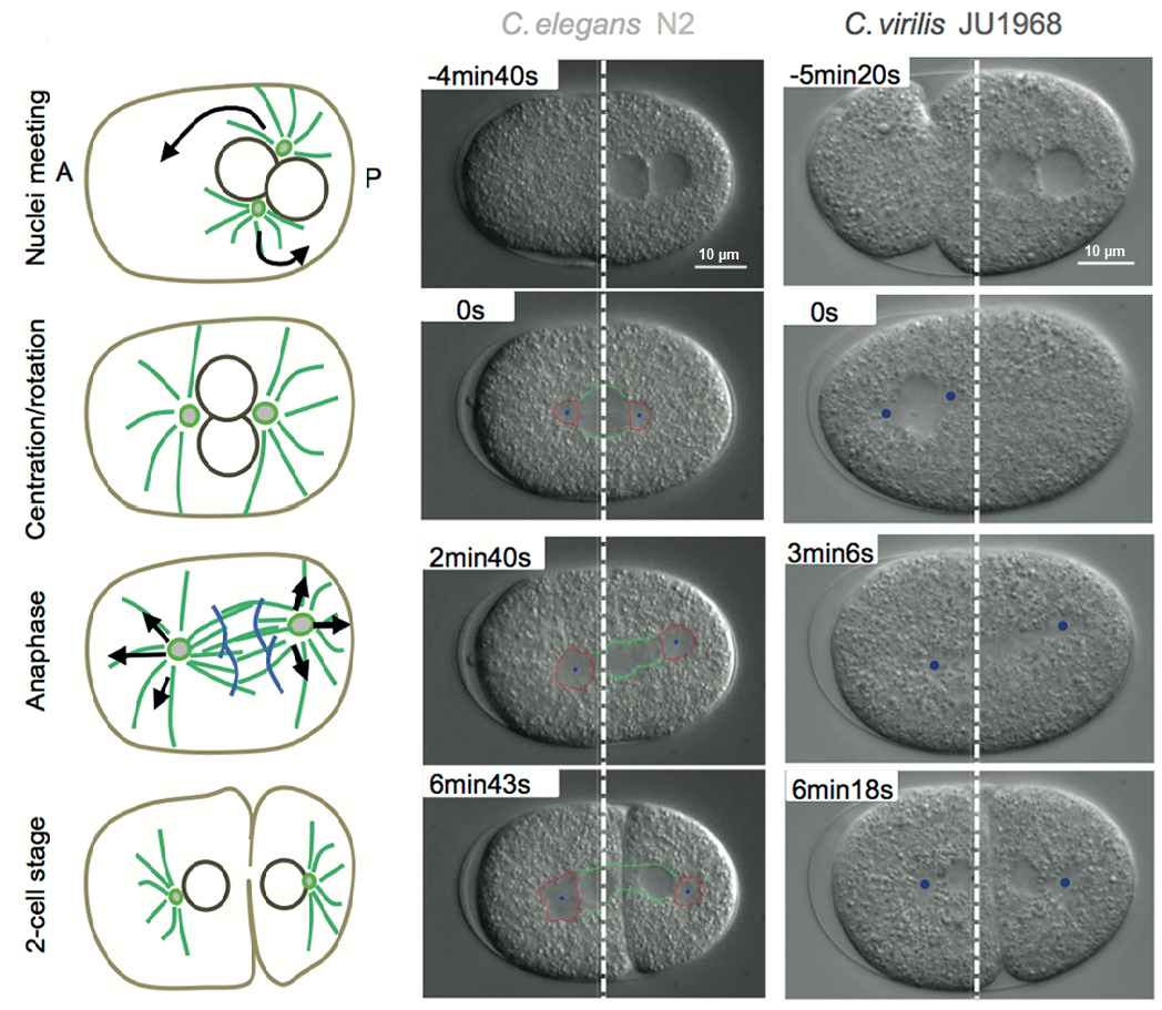 Fig 1.A. Patrones de movimientos del huso entre varias especies de nematodos. Izquierda: Representaciones esquemáticas de un embrión desde la reunión de los pronúcleos hasta la primera división celular. Los microtúbulos se muestran en verde y los cromosomas en azul. Las fuerzas mecánicas que tiran de los microtúbulos astrales son responsables de los movimientos de los núcleos y del huso y se muestran como flechas negras. Derecha: Imágenes fijas de los embriones de dos especies de Caenorhabditis (C. Elegans y C. virilis). El lado anterior A está a la izquierda y el posterior P a la derecha. La línea punteada blanca representa el centro de la célula. Los centrosomas (punto central en azul y contorno en rojo) se detectaron mediante un programa automatizado para C. Elegans, mientras que para C. virilis, los centrosomas se han rastreado manualmente. Microscopía: contraste de interferencia diferencial DIC.